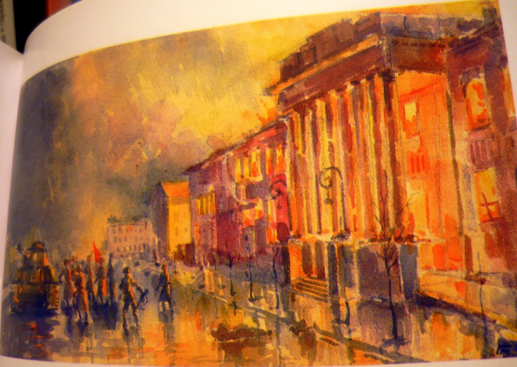 Червоний корпус палає підірваний німецькими загарбниками (6 листопада 1943 р): Червоний корпус палає підірваний німецькими загарбниками (6 листопада 1943 р)